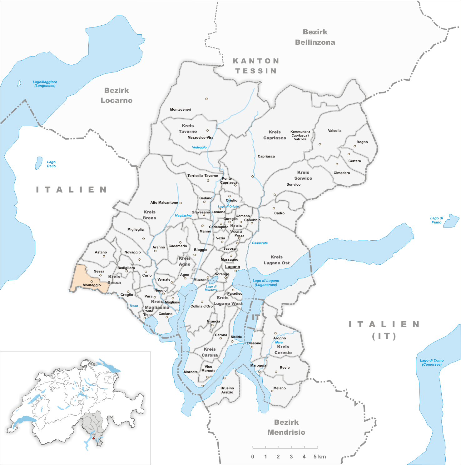 Municipality Monteggio